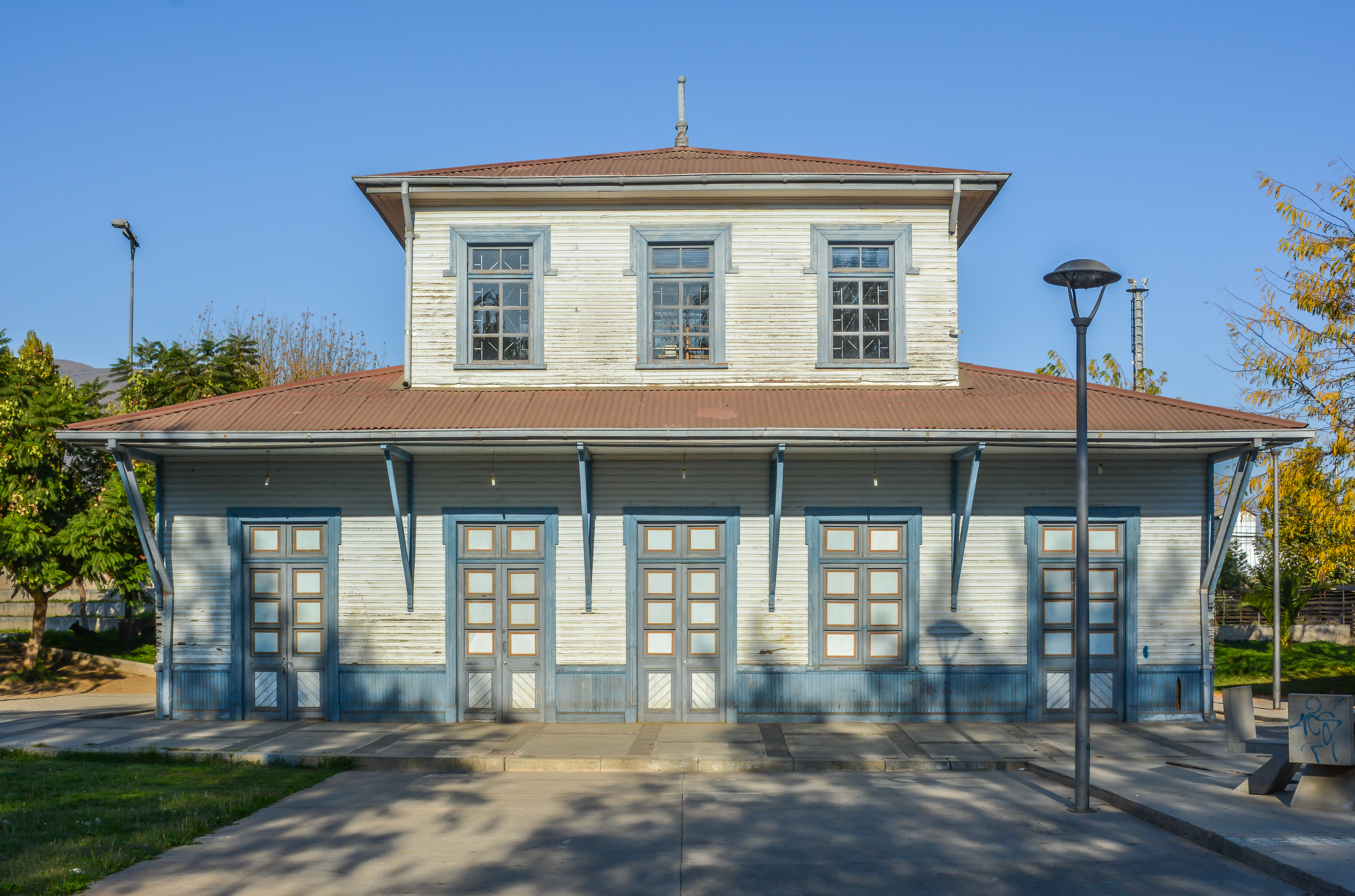 Estación Salamanca, Salamanca, Región de Coquimbo, Chile.